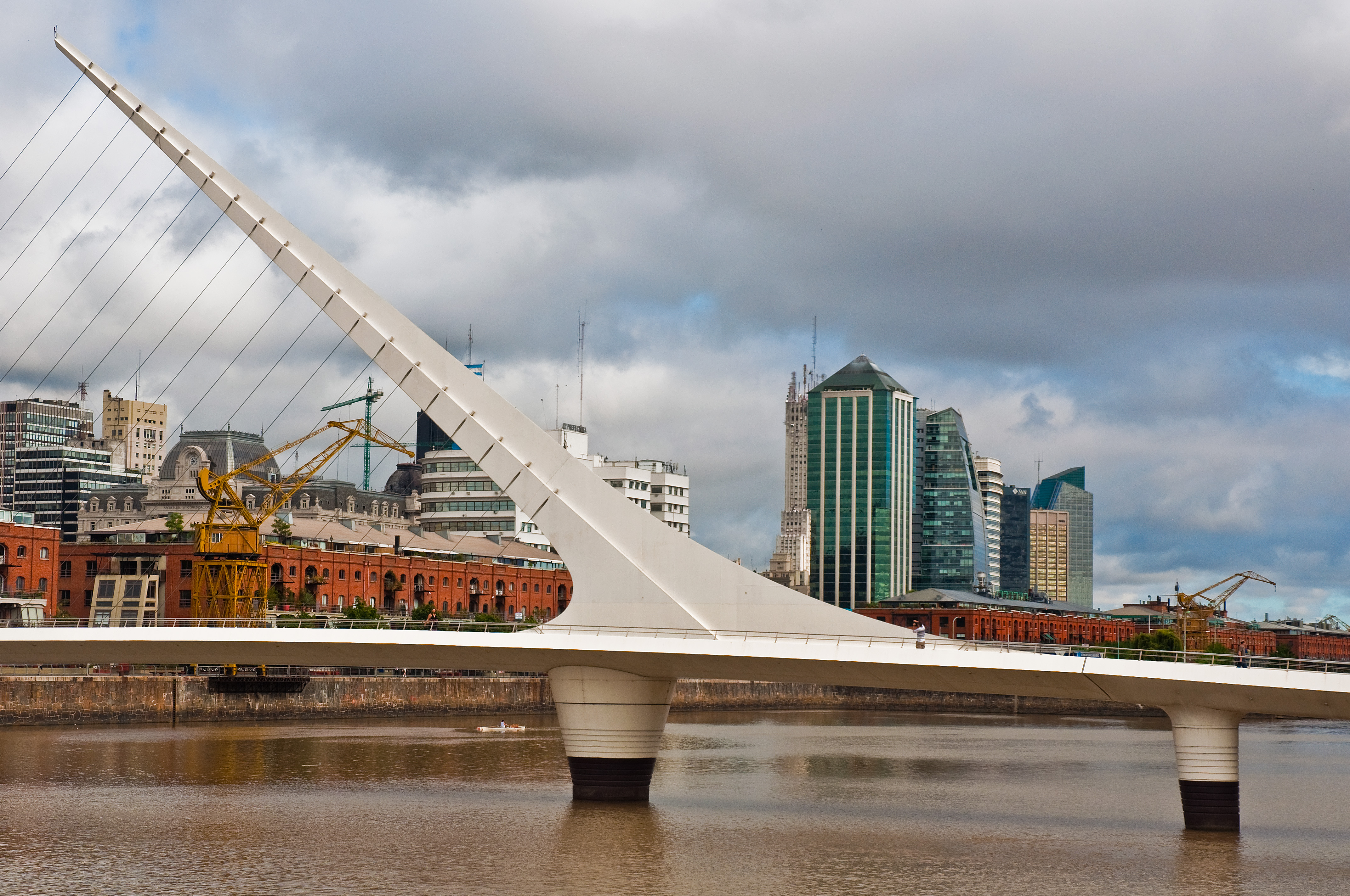 Puente de la Mujer, Puerto Madero, Buenos Aires, Argentina, 29th. Dec. 2010